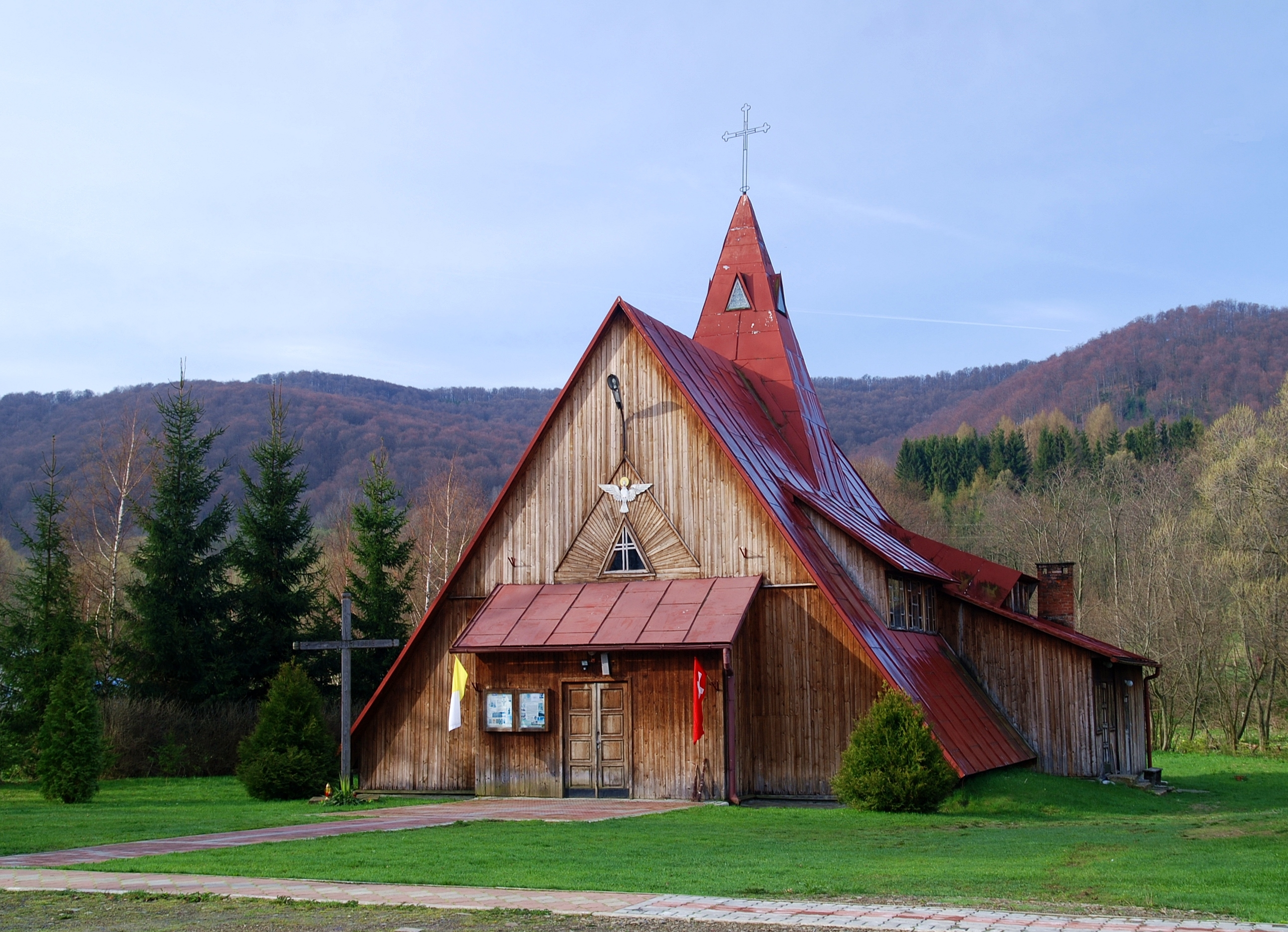 wieś Wetlina